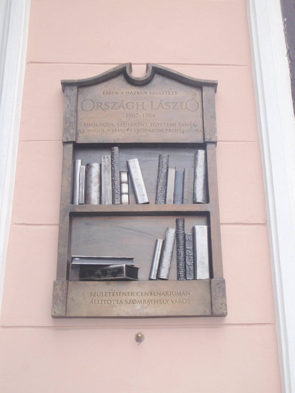 Denktafel von Laszlo Orszagh in Steinamanger, in Geburtshaus